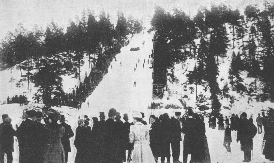 Saltsjöbadens skidbacke